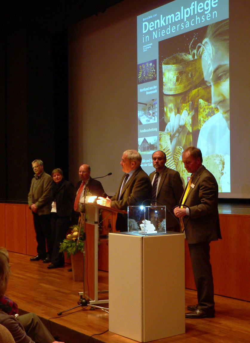 Öffentliche Informationsveranstaltung am 19. April 2012 im Theater Syke zu archäologischen Funden bei der NEL-Pipeline und Goldhort Gessel in Syke mit Mitarbeitern und Wissenschaftlern des Niedersächsischen Landesamtes für Denkmalpflege (NLD) sowie der Leibniz Universität Hannover und dem Bürgermeister von Syke, v.l.n.r.: Bernd Rasink (NLD), Carla Vogt (Universität Hannover), Stefan Winghart (NLD), Henning Haßmann (NLD), Friedrich-Wilhelm Wulf (NLD), Bürgermeister Harald Behrens, im Vordergrund im durchsichtigen Kasten eine Nachbildung des Goldhortes in Kunststoff